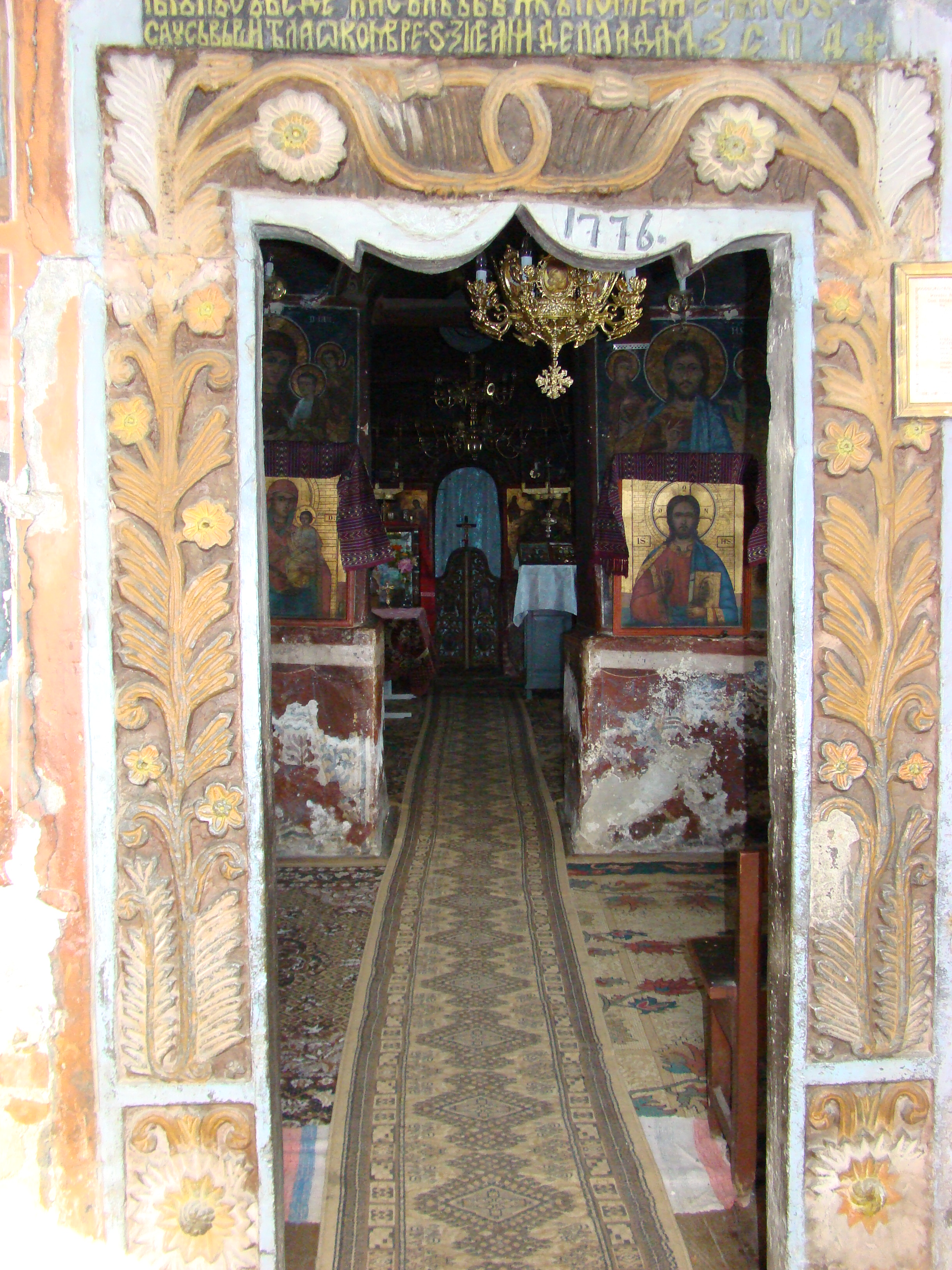 Biserica „Intrarea în Biserică a Maicii Domnului” sat Bărbătești, cătun Mierlești, județul Vâlcea